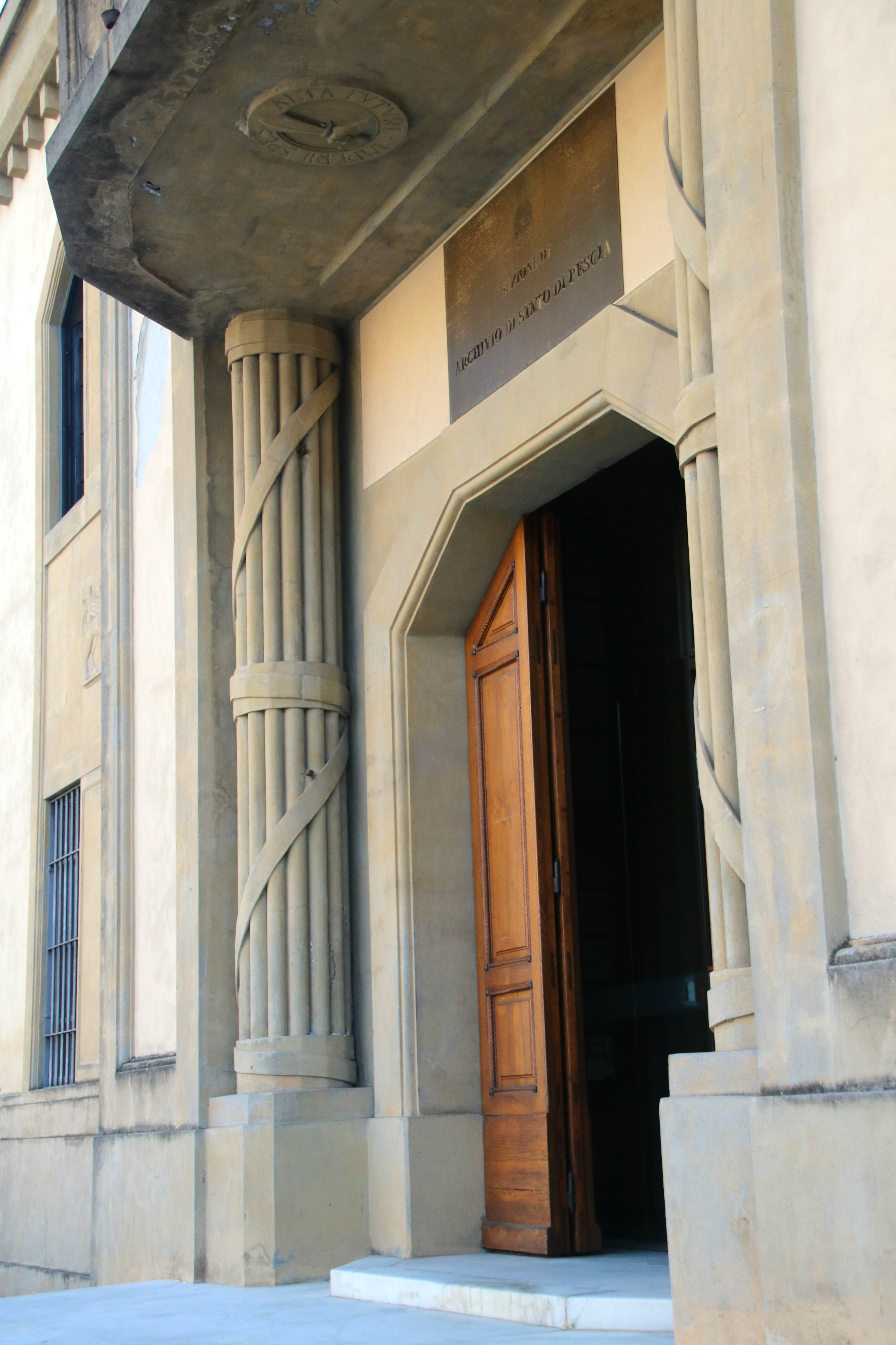 Sezione di Archivio di Stato di Pescia This is a photo of a monument which is part of cultural heritage of Italy.